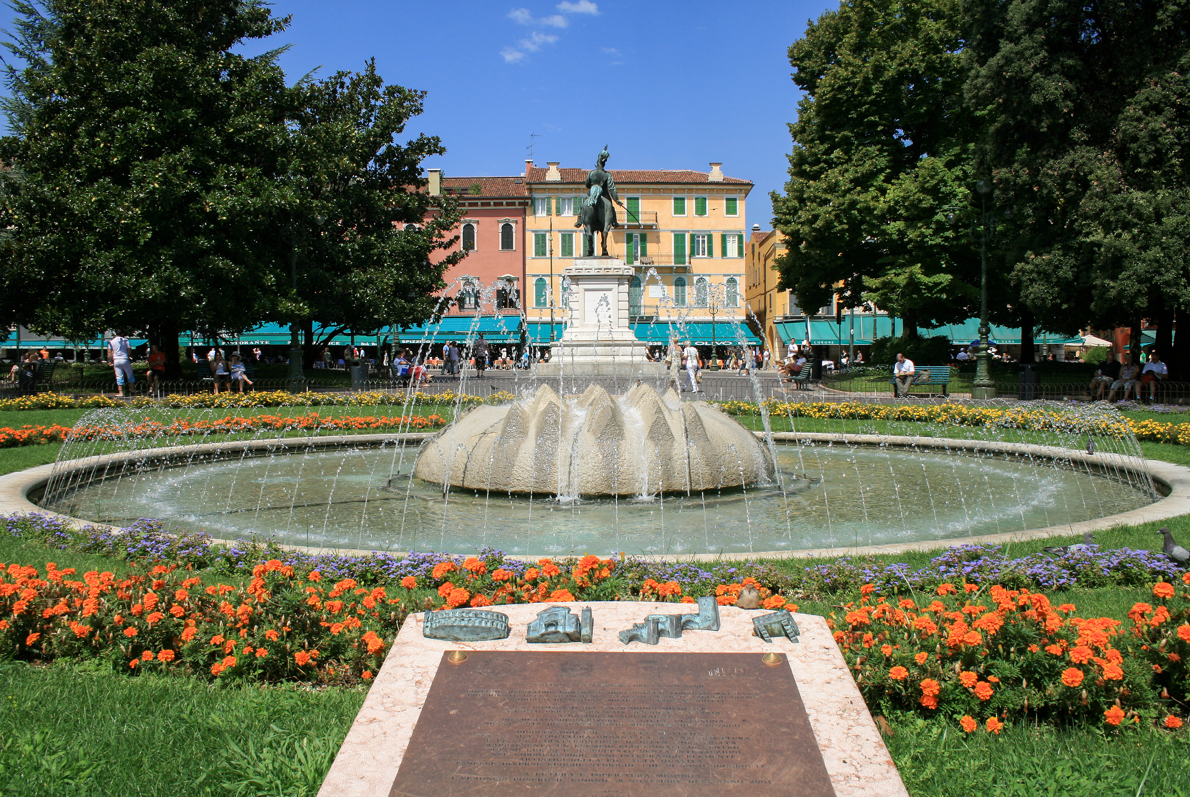 piazza Bra This is a photo of a monument which is part of cultural heritage of Italy.